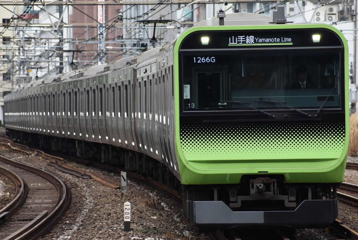 1266G E235系東トウ13 ＠恵比寿駅